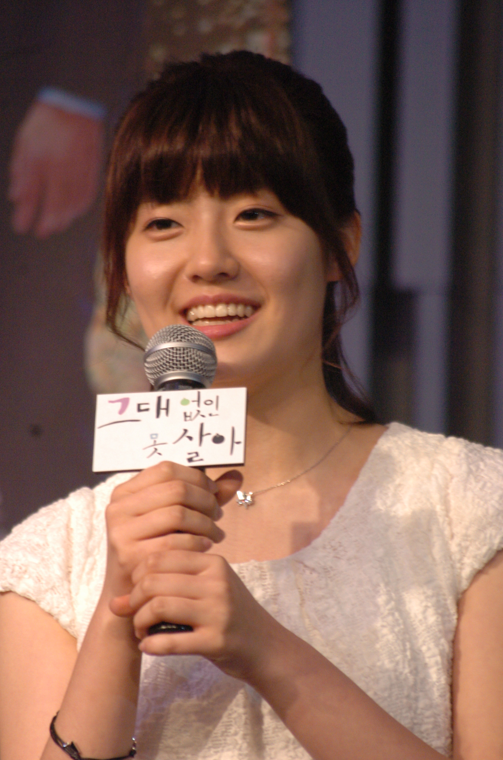 그대없인못살아 014